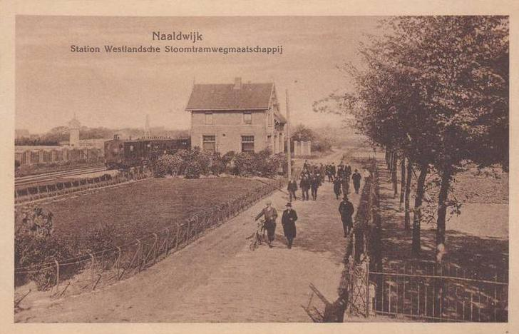 Tramstation van de Westlandsche Stoomtramwegmaatschappij in Naaldwijk in 1916